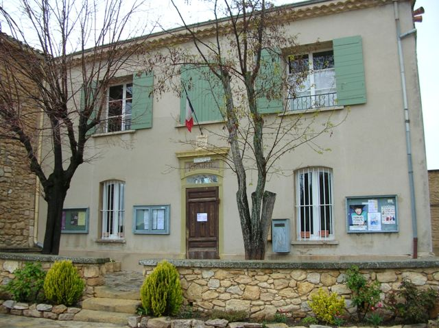 Mairie de Saint-Marc-Jaumegarde (Bouches-du-Rhône, France)